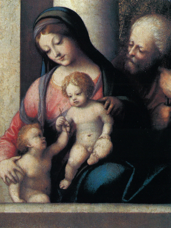 Correggio, sacra famiglia, LACMA